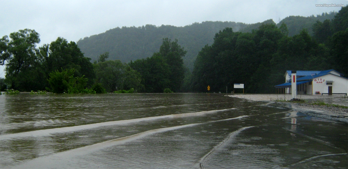 Магистрални пут Теслић-Добој у селу Врела, на локалитету Перило, поплављен приликом љетњих пљускова, када Велика Усора плави околно подручје и прекида саобраћај.